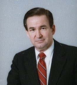 Pat Buchanan 1985